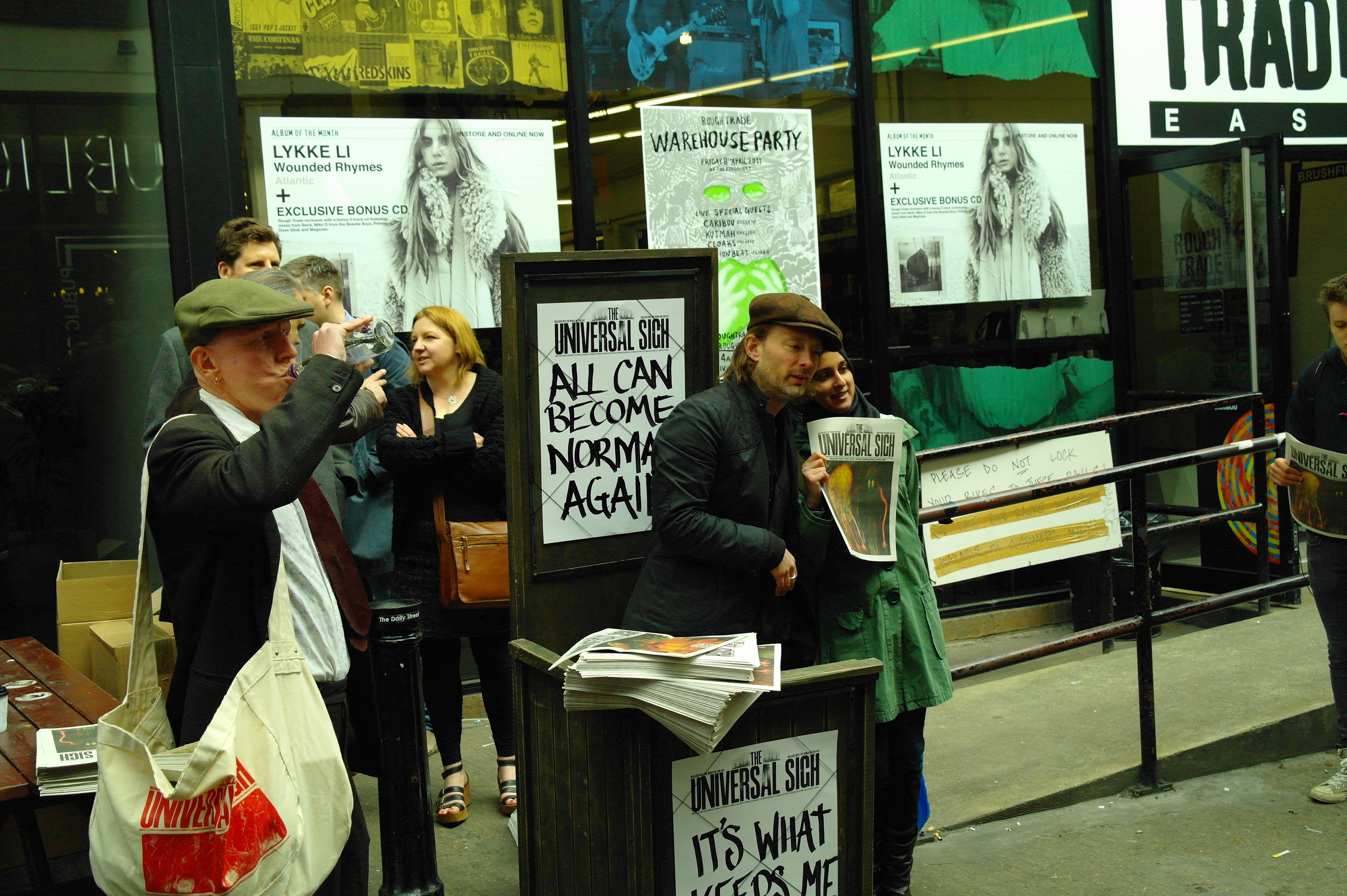 Thom Yorke y Stanley Donwood distribuyendo en Londres el periódico The Universal Sigh como parte de la promoción del álbum de Radiohead The King of Limbs en marzo de 2011.